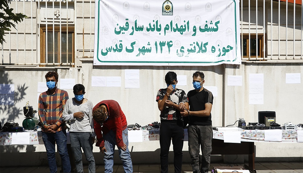 دستگیری چند دزد در ایران